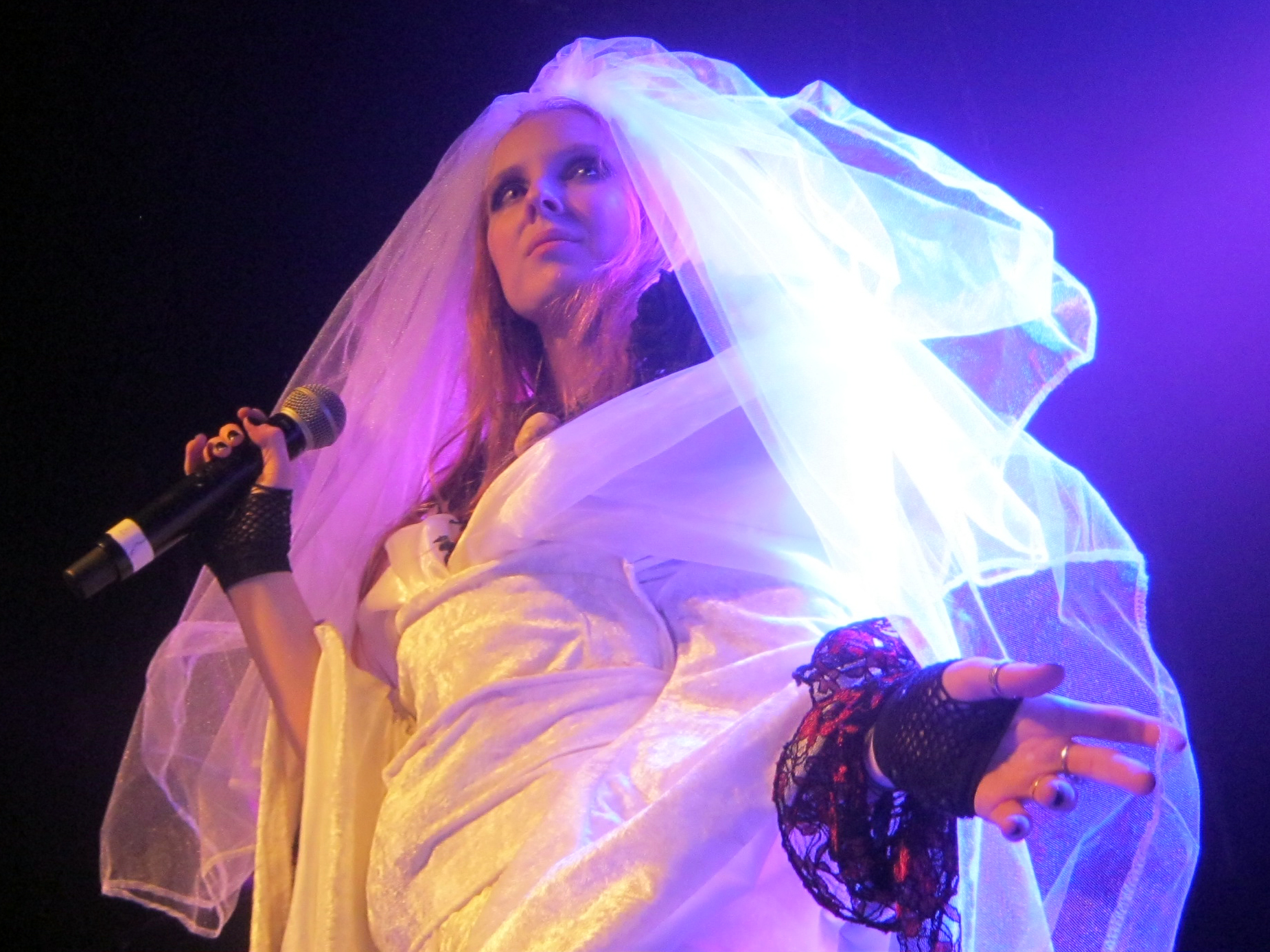 Infy Snow, live gig 14/01/2016